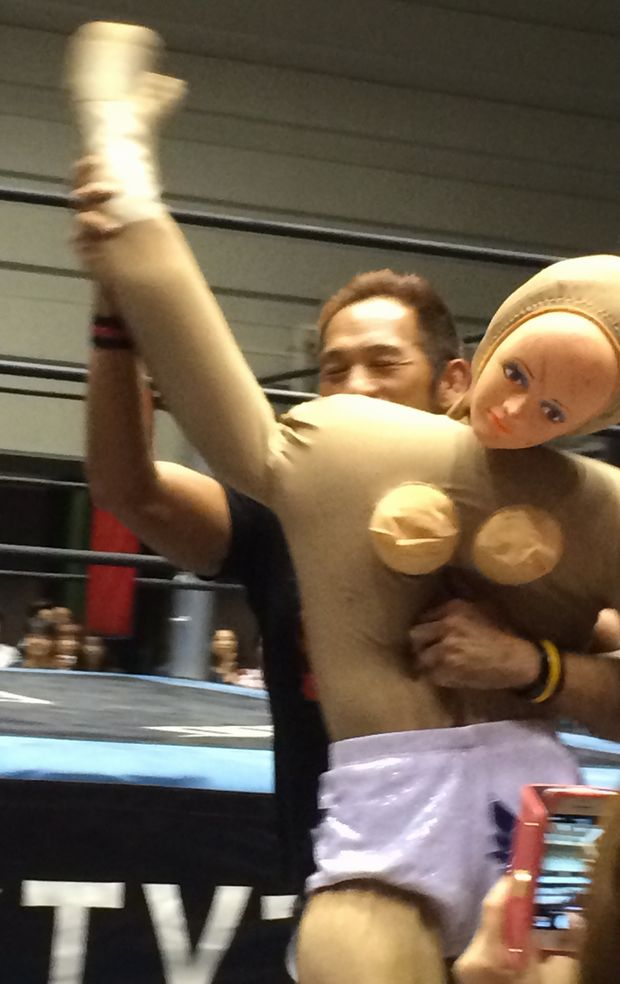 大阪府立第二